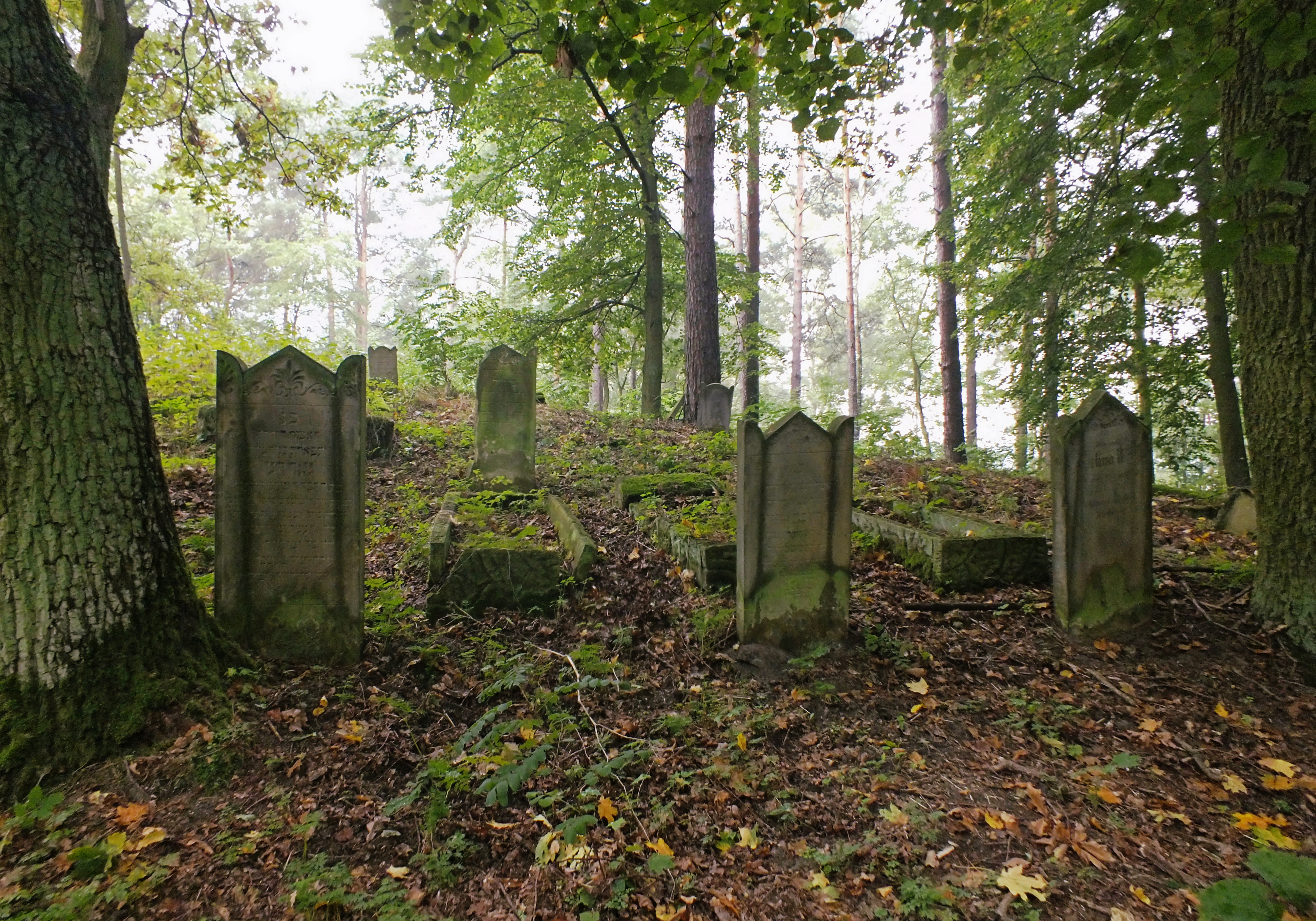 Cmentarz żydowski (kirkut) w Trzcielu